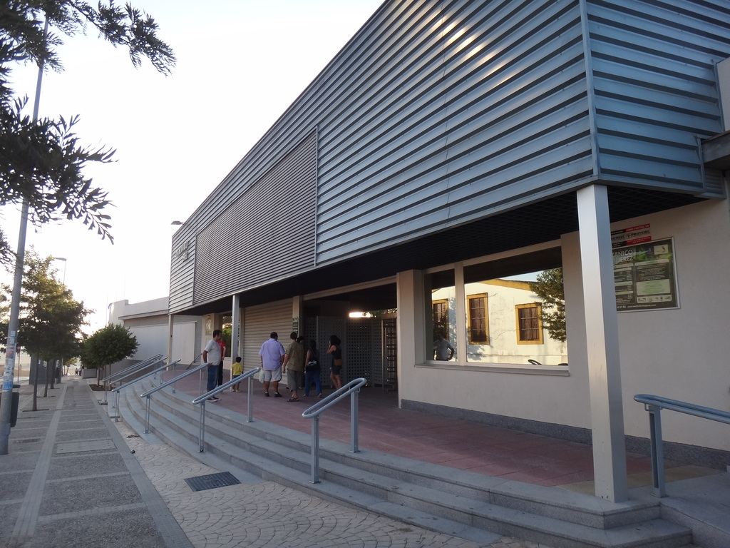 Entrada a Zoo Jerez